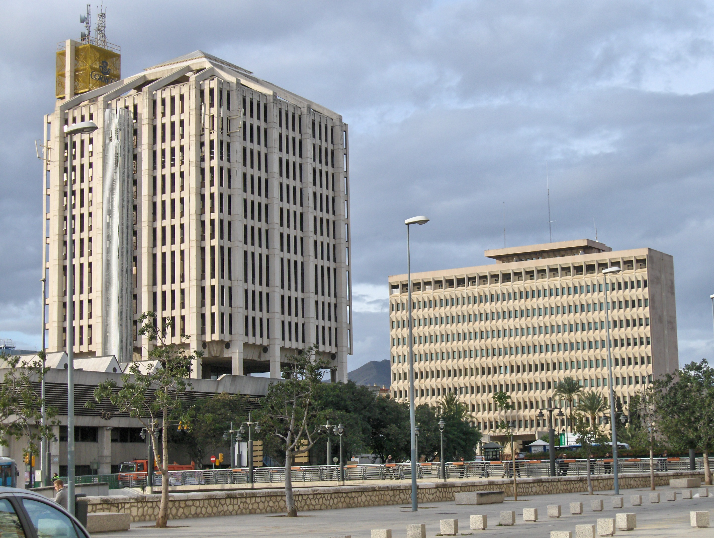 Edificios de la entrada del Polígono Alameda situados a ambos lados del puente de Tetuán (Málaga, España). A la derecha la Delegación de Hacienda. A la izquierda Correos.